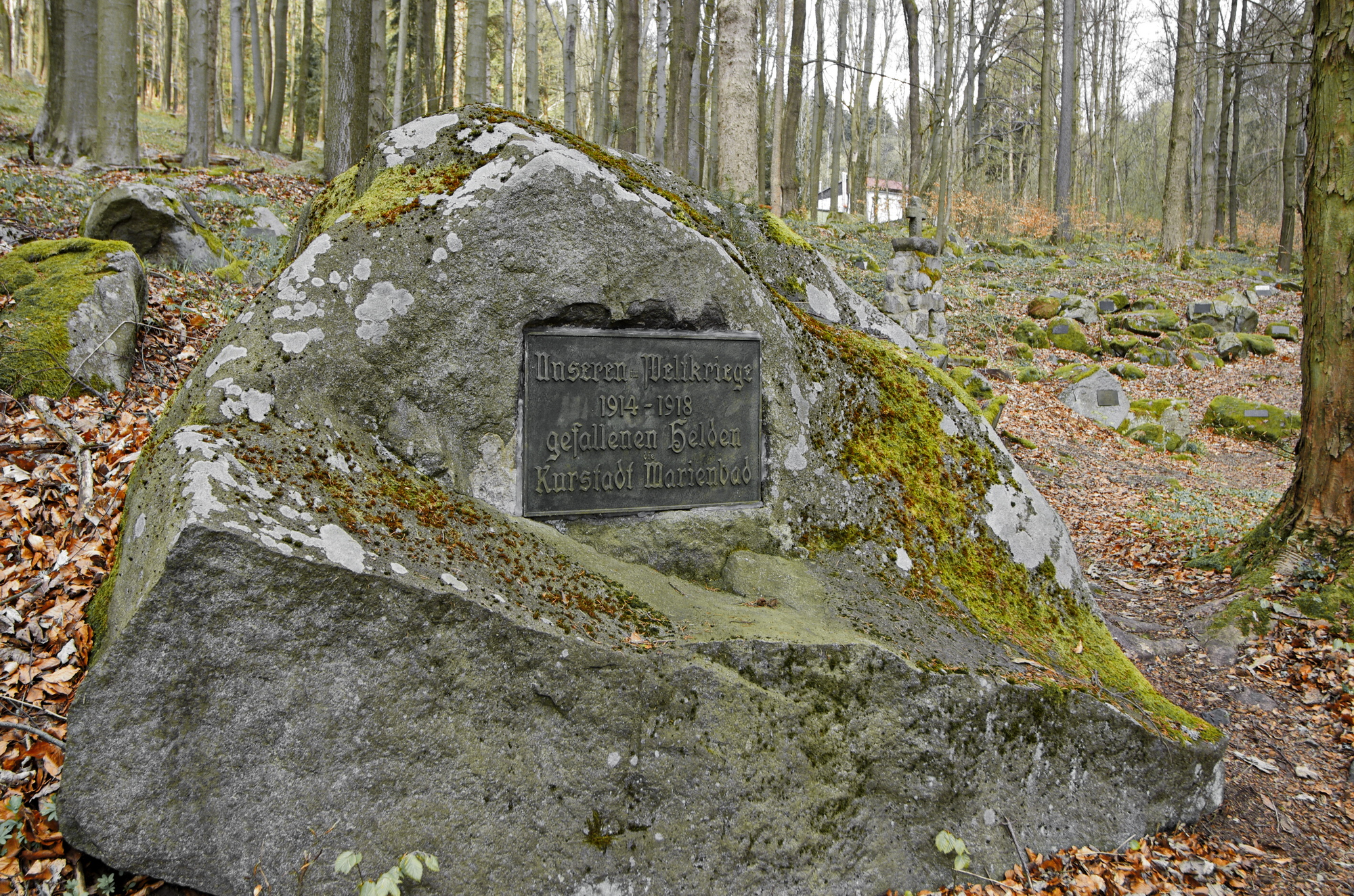 Mariánské Lázně Geopark zastanení č. 21 - symbolický hřbitov obětí 1. světové války - občanů Mariánských Lázní